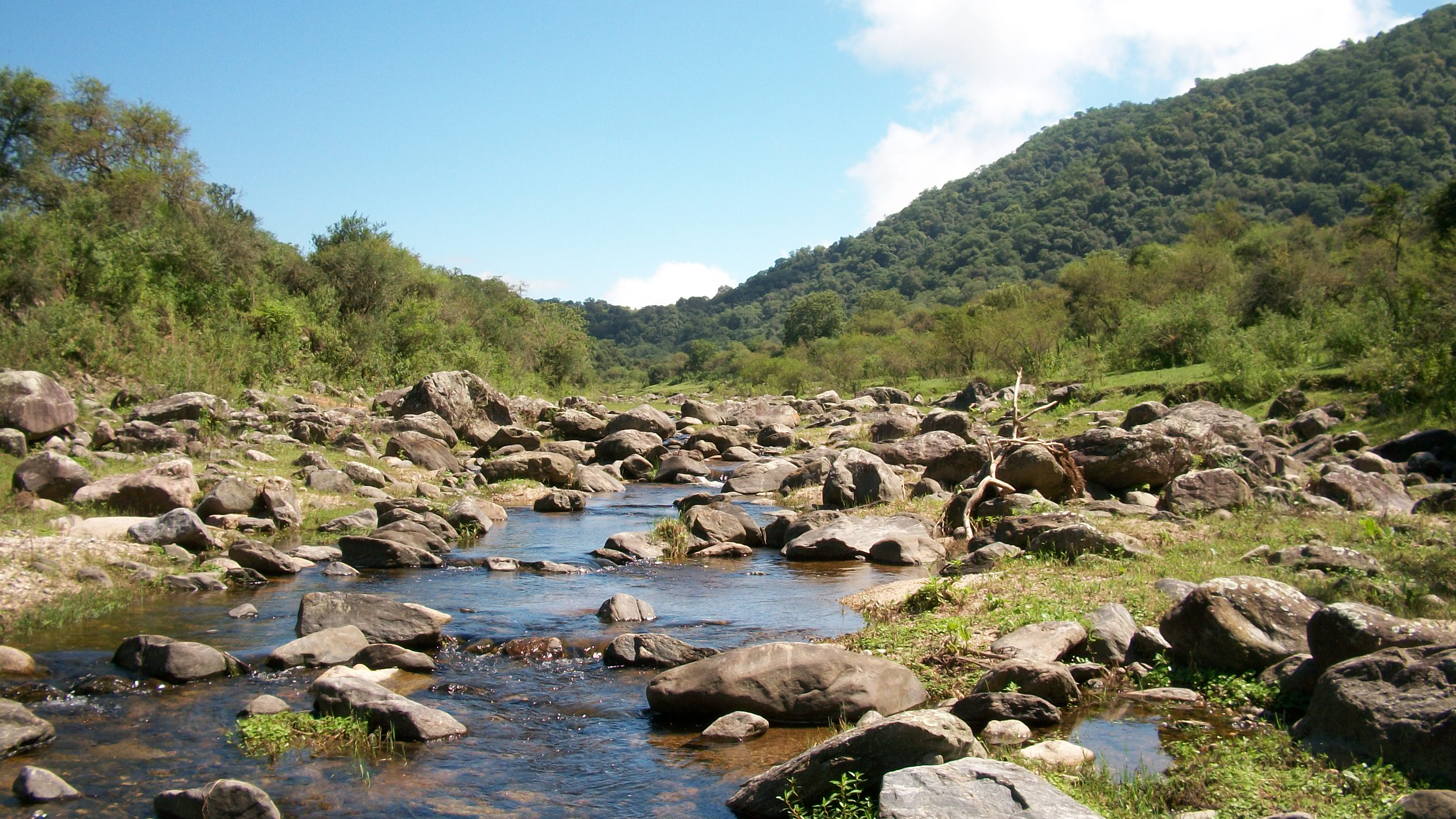 El Rio El Potrerillo, fluyendo sobre el pueblo homónimo también conocido como Río Huacra.